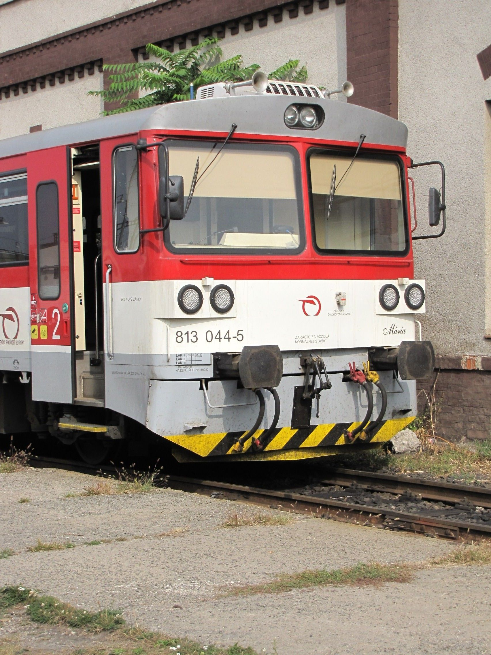 Szlovákia, Érsekújvár (Nové Zámky), SK-ZSSK 813 044-5 (Mária)